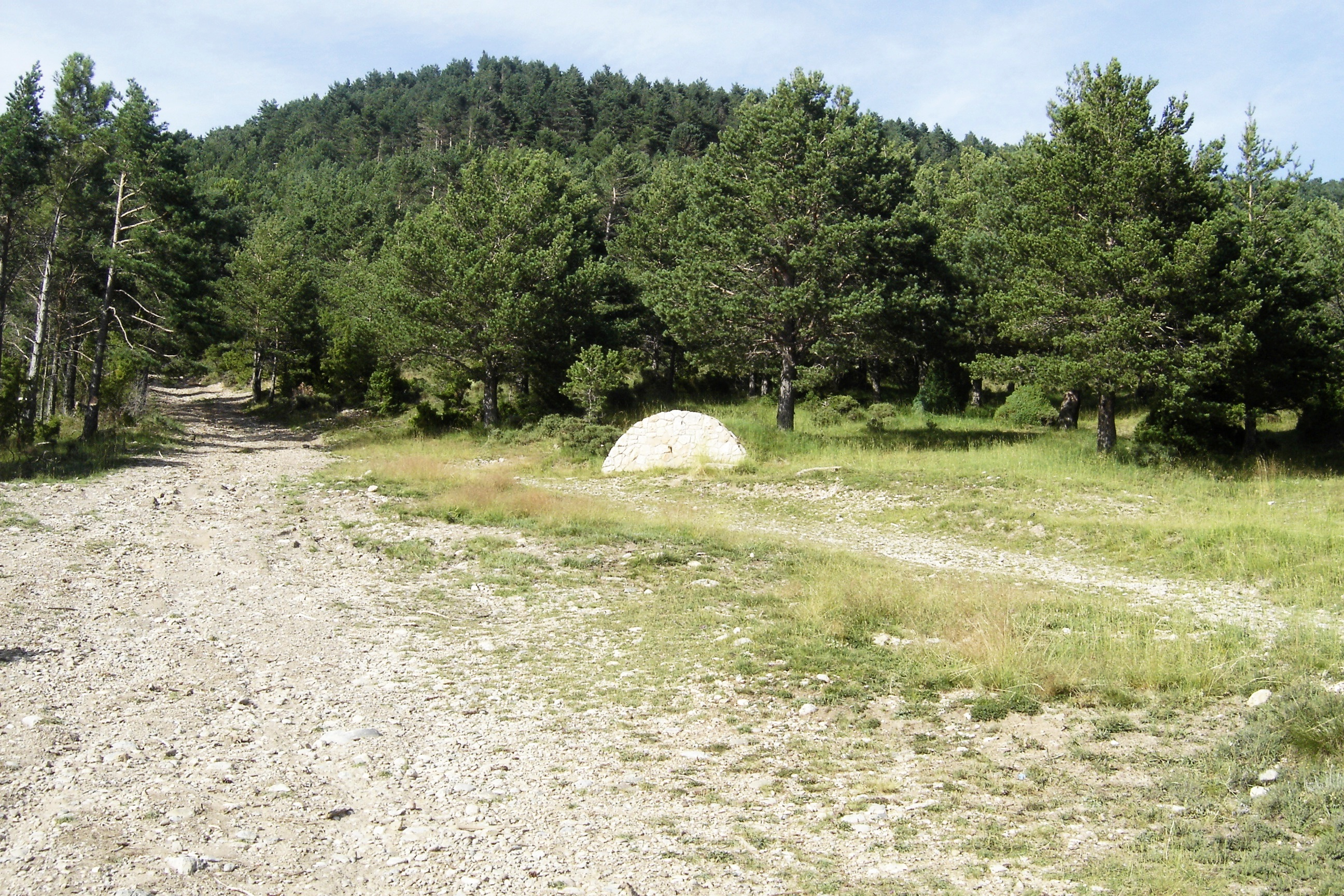 La font del Teixó. Vista general del planell on es troba.